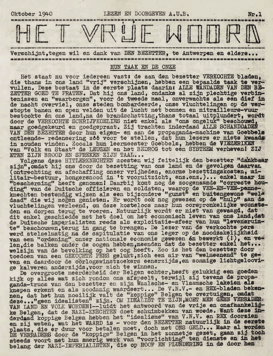 Het Vrije Woord - Oktober 1940 - Journal clandestin belge durant la Seconde Guerre mondiale